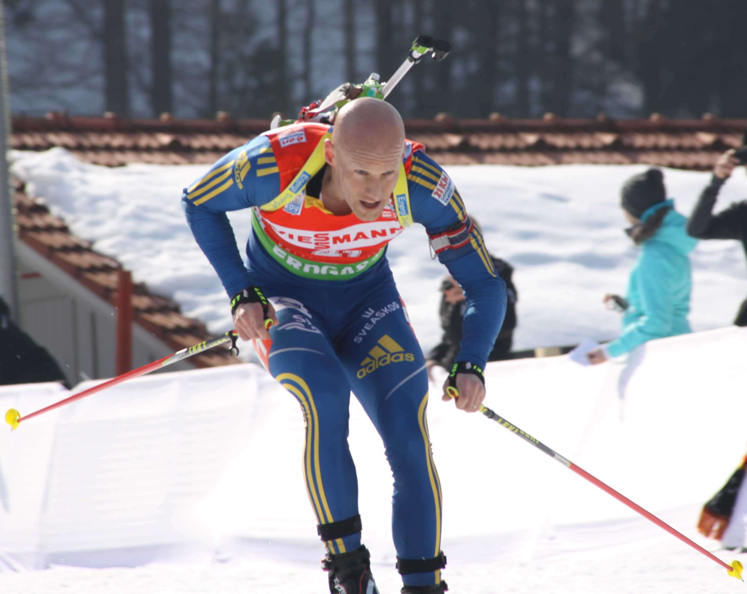 Carl Johan Bergman bei der WM in Ruhpolding